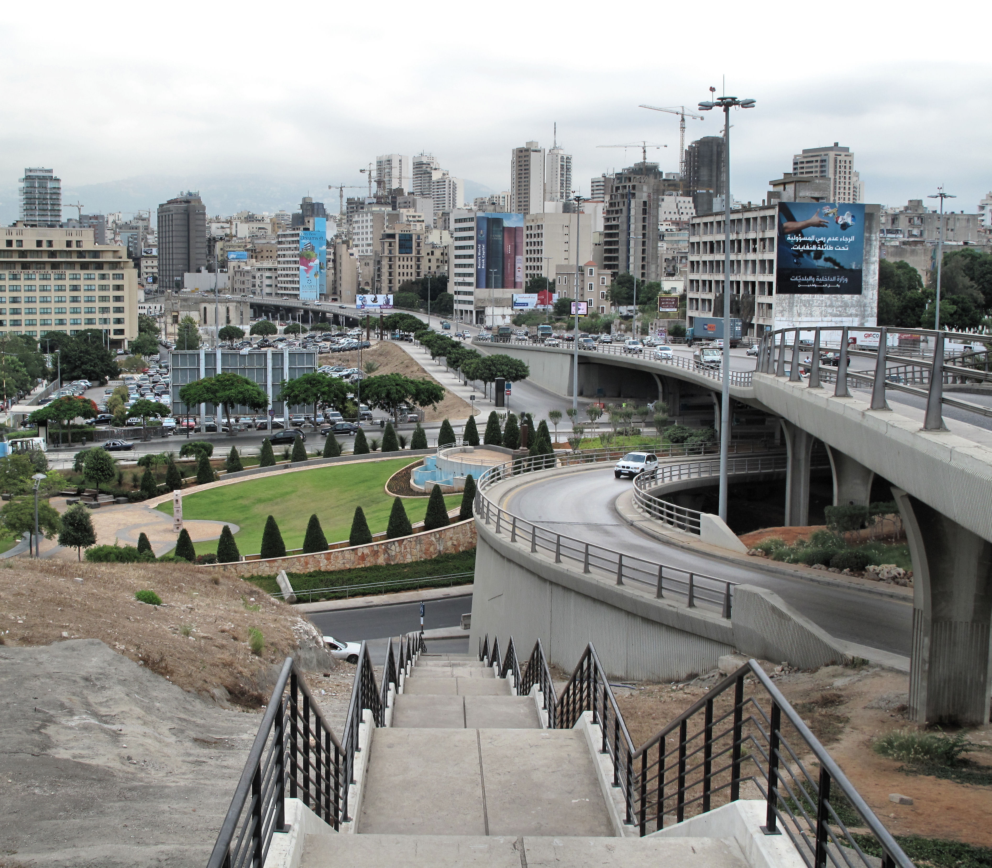 Gebrag Khalil Garden